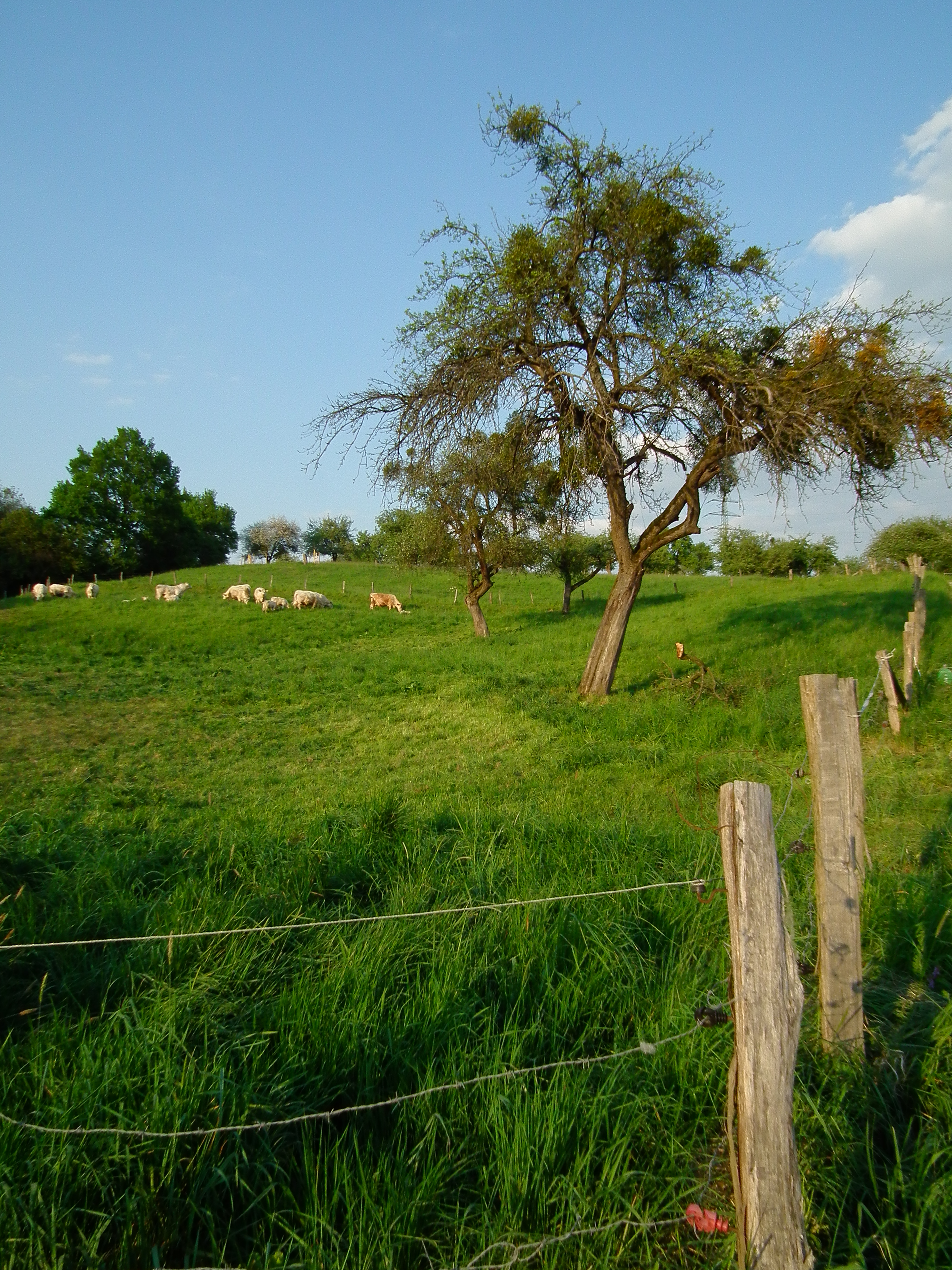 Charolais auf einer Weide in der Nähe von Linnenbach im Kreis Bergstraße (Hessen, Deutschland)